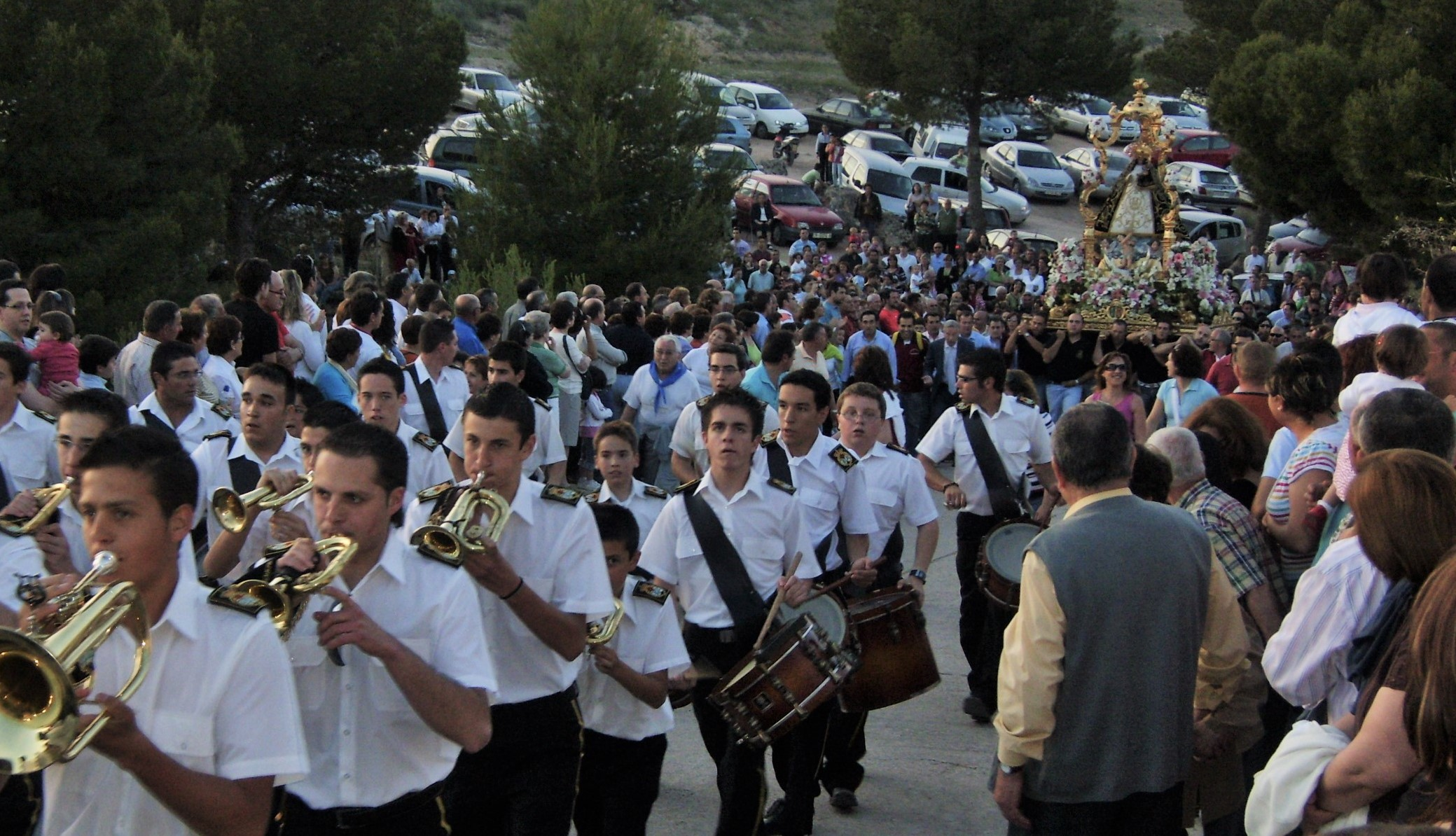 Procesión trasladando la Virgen de Criptana a su santuario.